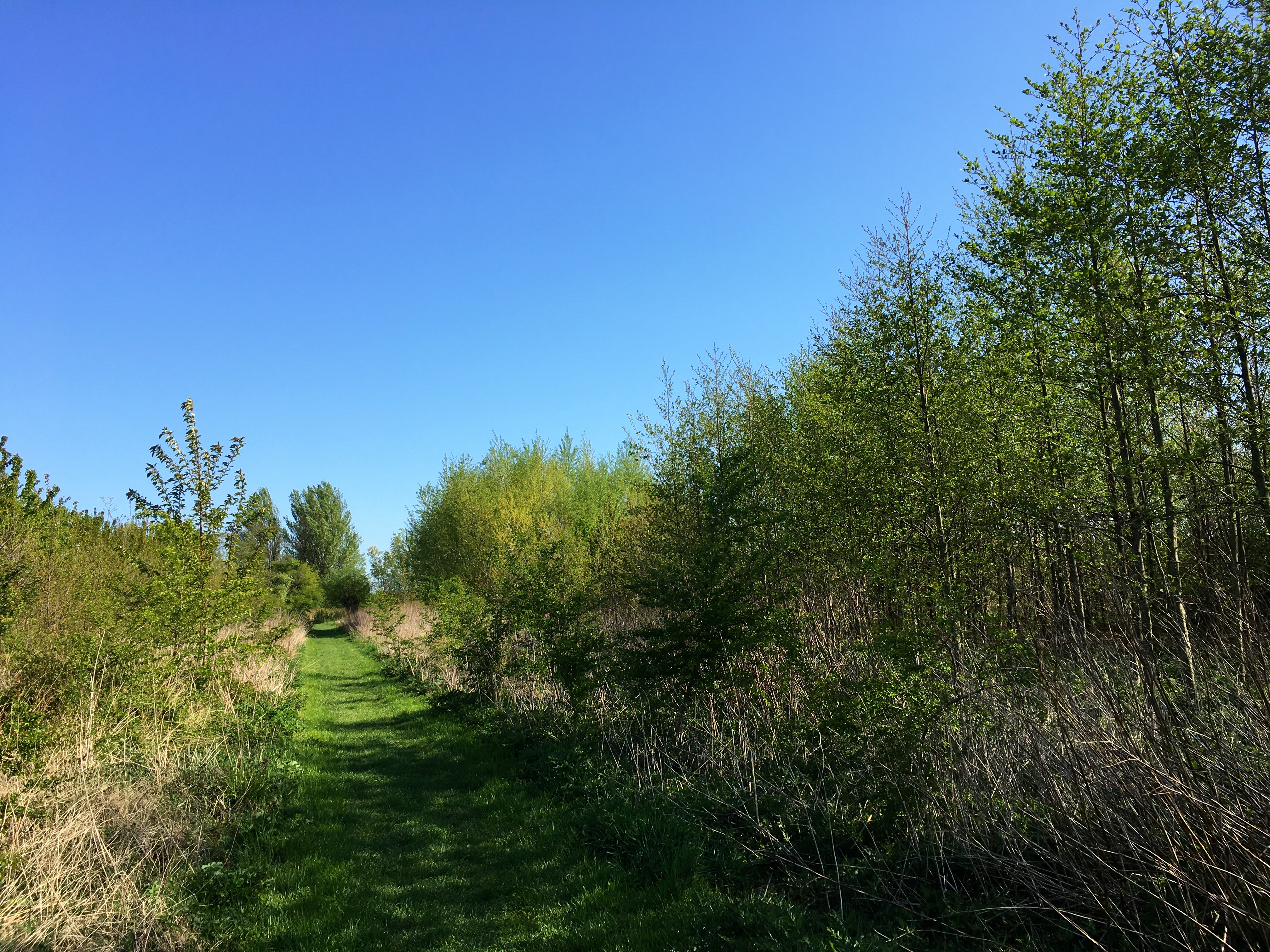 Een voedselbos in Landgoed Doornik van Park Lingezegen in Bemmel (Lingewaard)